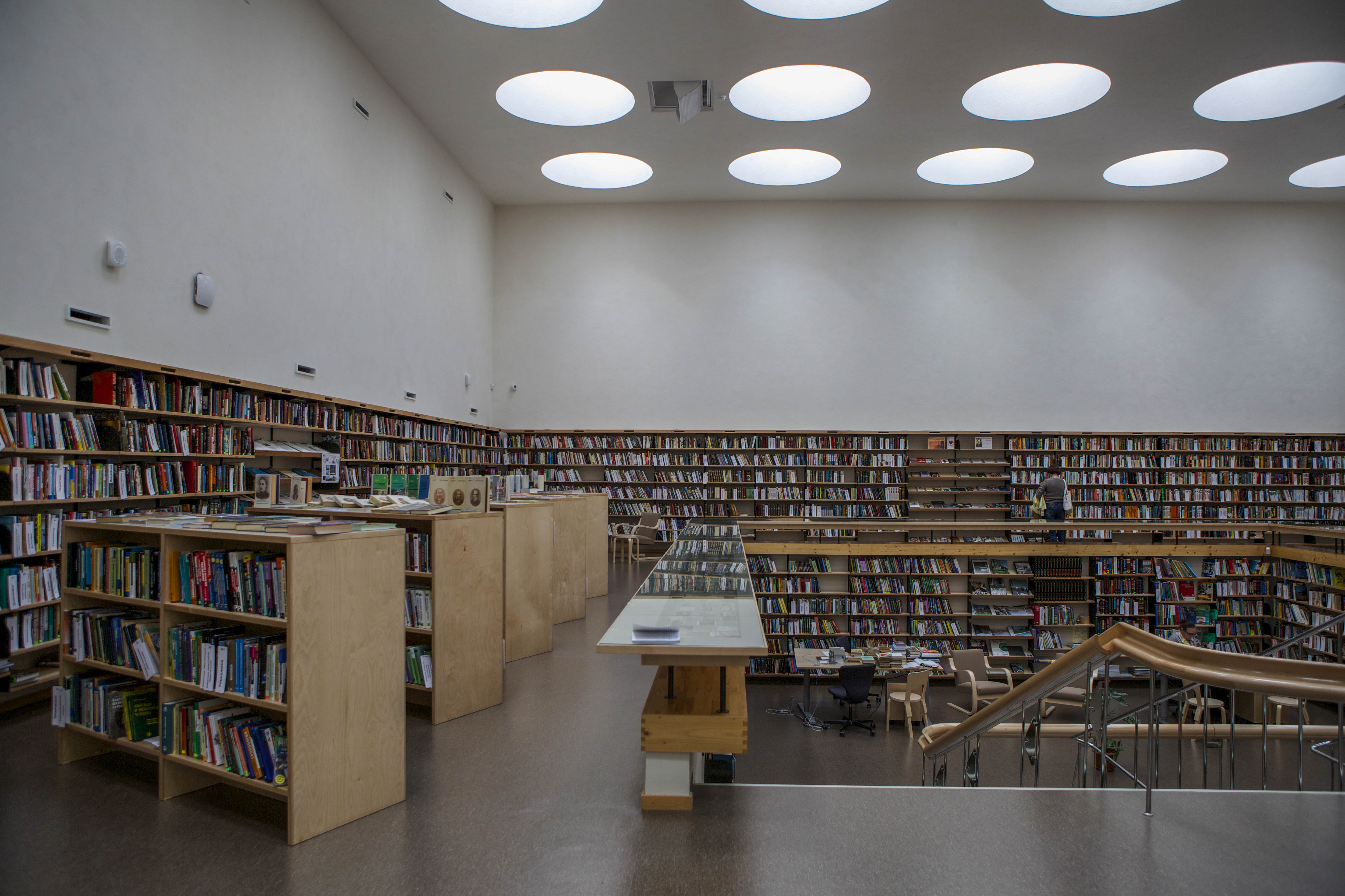 Библиотека Алвара Аалто, Библиотека Выборга